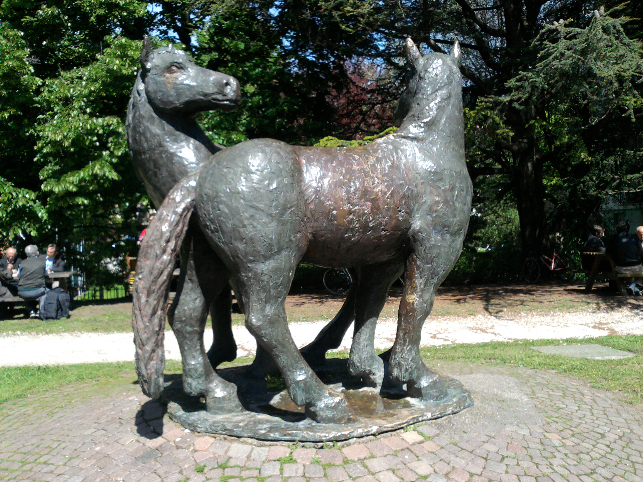 I cavalli bronzei di Hans Plangger lungo la Passeggiata Lungo Isarco Destro a Bolzano